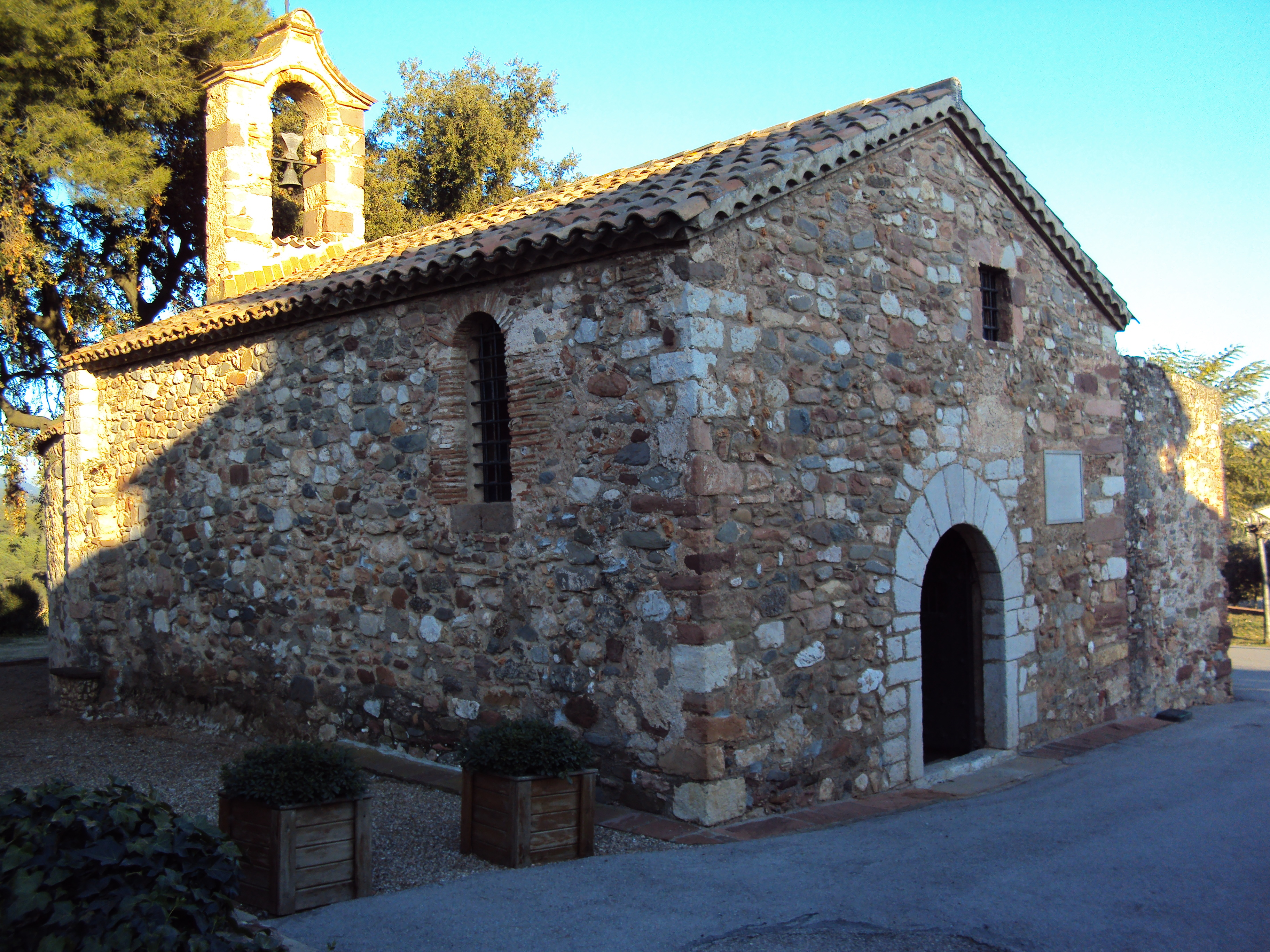 Ermita romànica de Santa Magdalena de Puigbarral (Terrassa), del segle XIII.